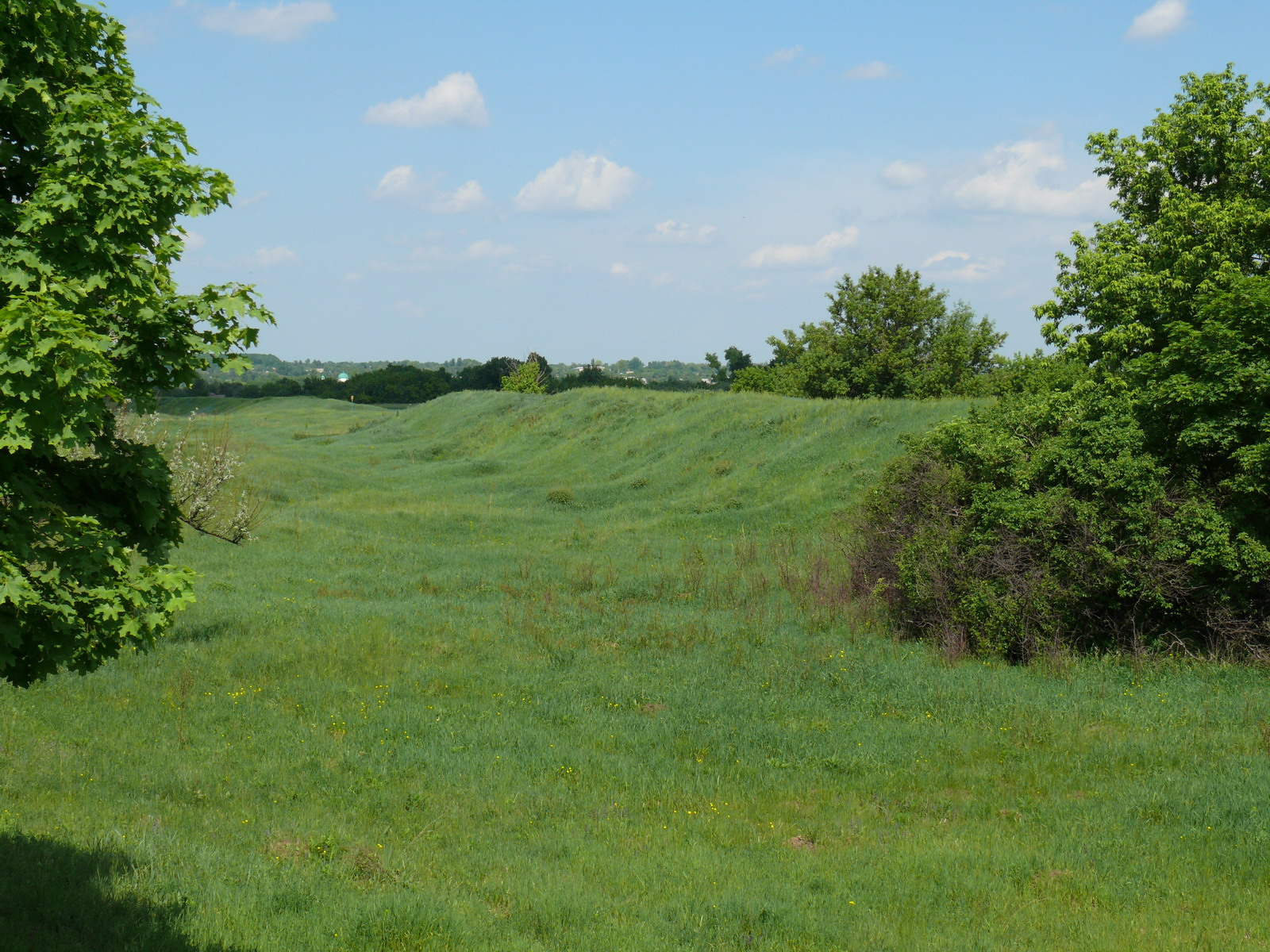 Нетронутый Турецкий вал